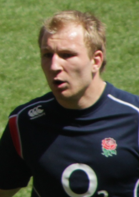 England v Barbarian 2013